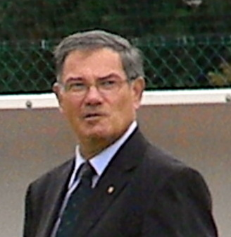 Charles Pour lors de l'engagement de la finale du championnat de France masculin de hockey sur gazon 2013.